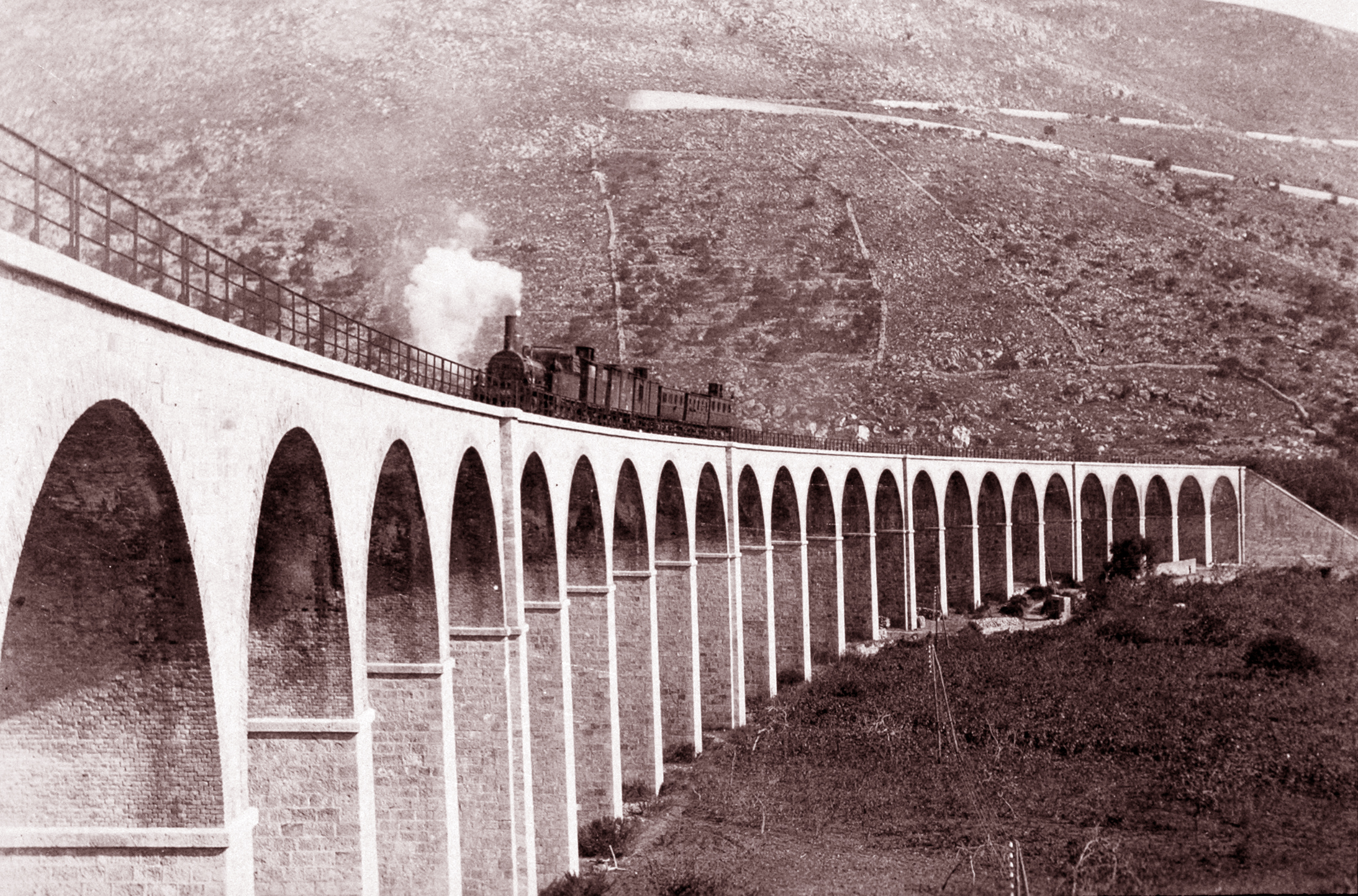 I 25 ponti ai tempi del funzionamento della ferrovia.